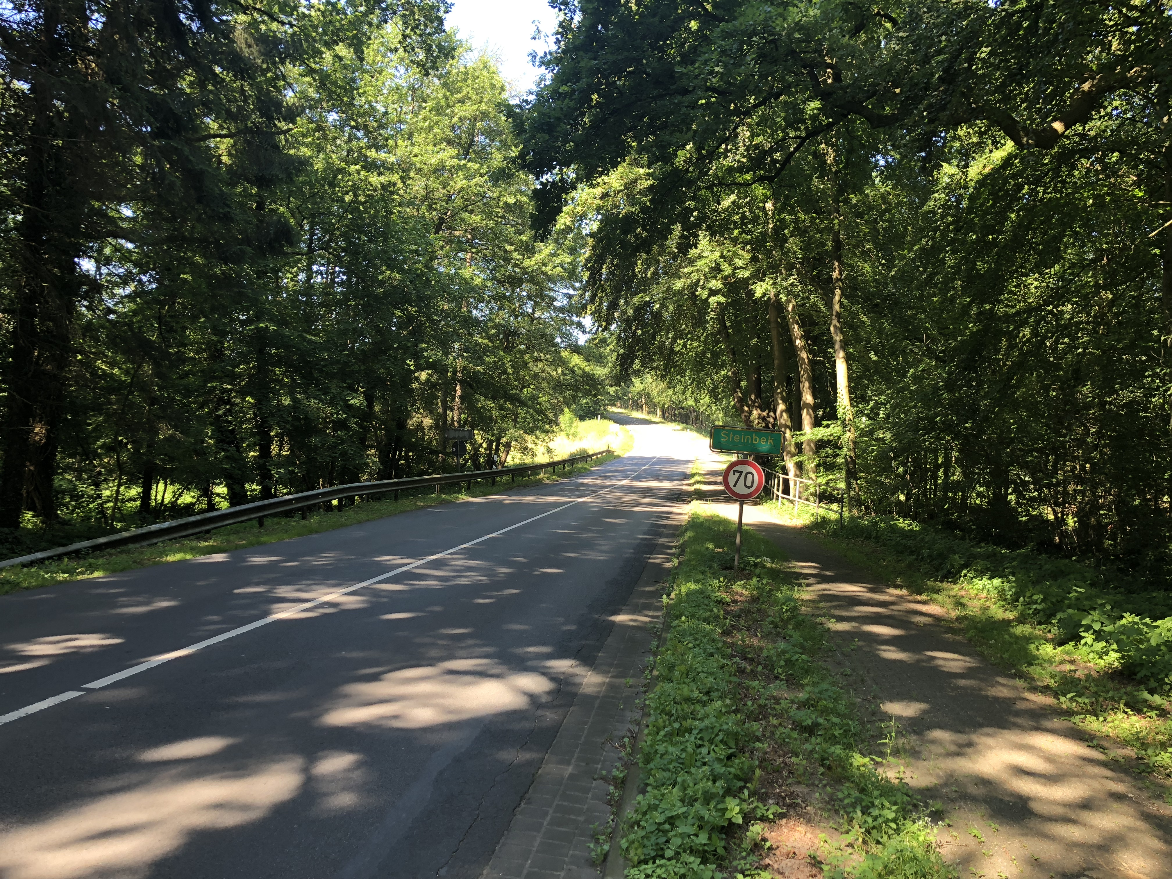 Kreisstraat 26 mit de Brügg över’n Steenbeek in Rutenbeek